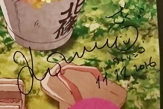 日本の音楽家、コトリンゴによるサイン。映画『この世界の片隅に』の上映期間中、ユーロスペースに飾られていた映画ポスターより抜粋。